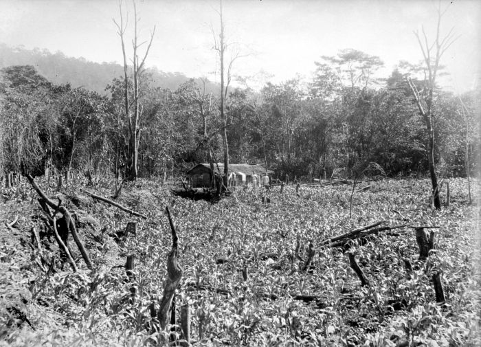 Negatief. 'Tuin' in de bergmeer streek. Het bos is gekapt, daarna gedroogd, gebrand waarna er maïs is geplant, Midden Boeroe